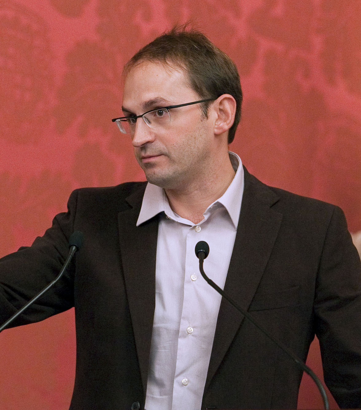 Esmorzar-col·loqui Joan Herrera, 18 doctubre de 2010